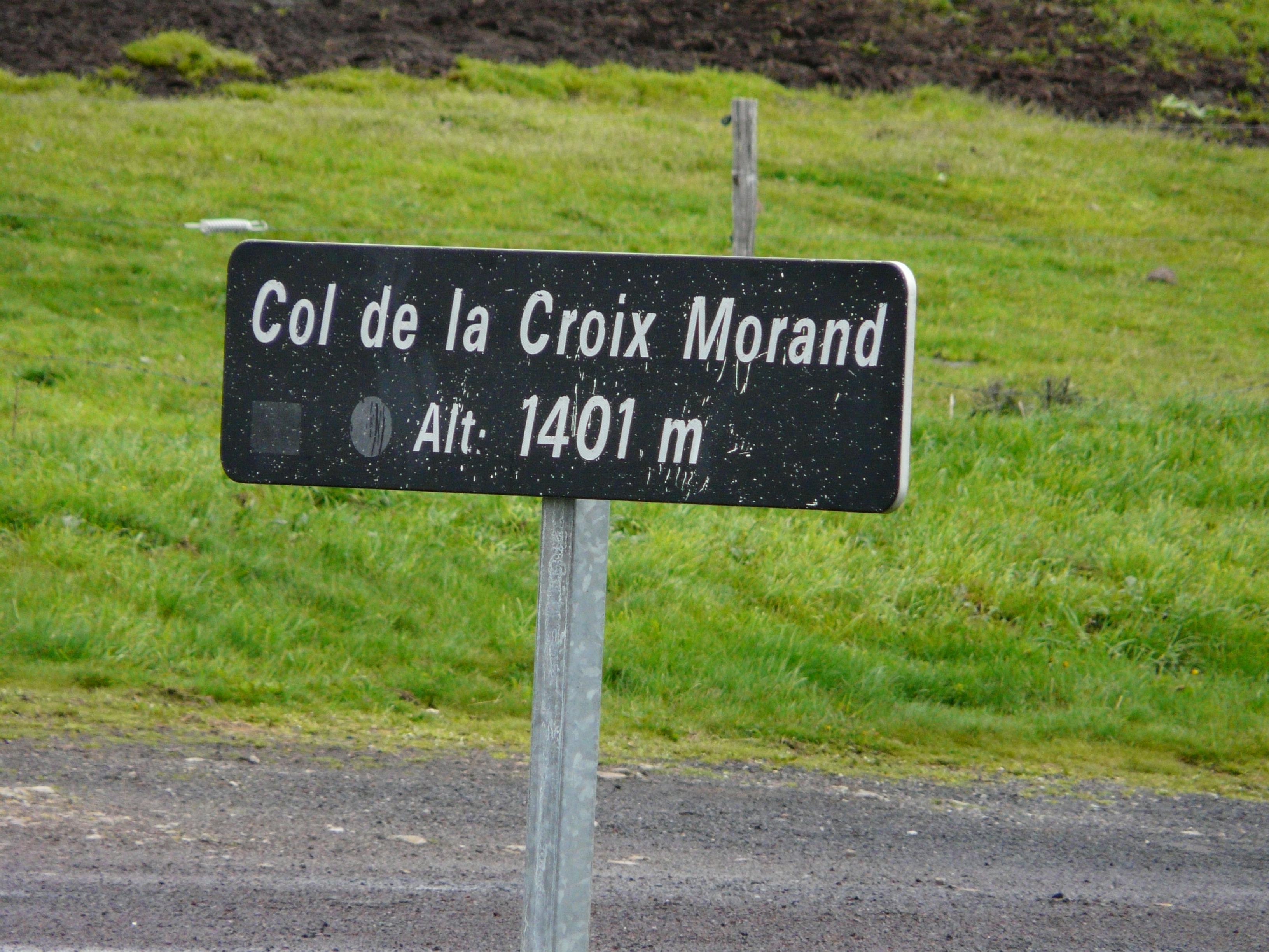 Panneau du col de la Croix Morand (1401 m), Chambon-sur-Lac, Puy-de-Dôme, France.